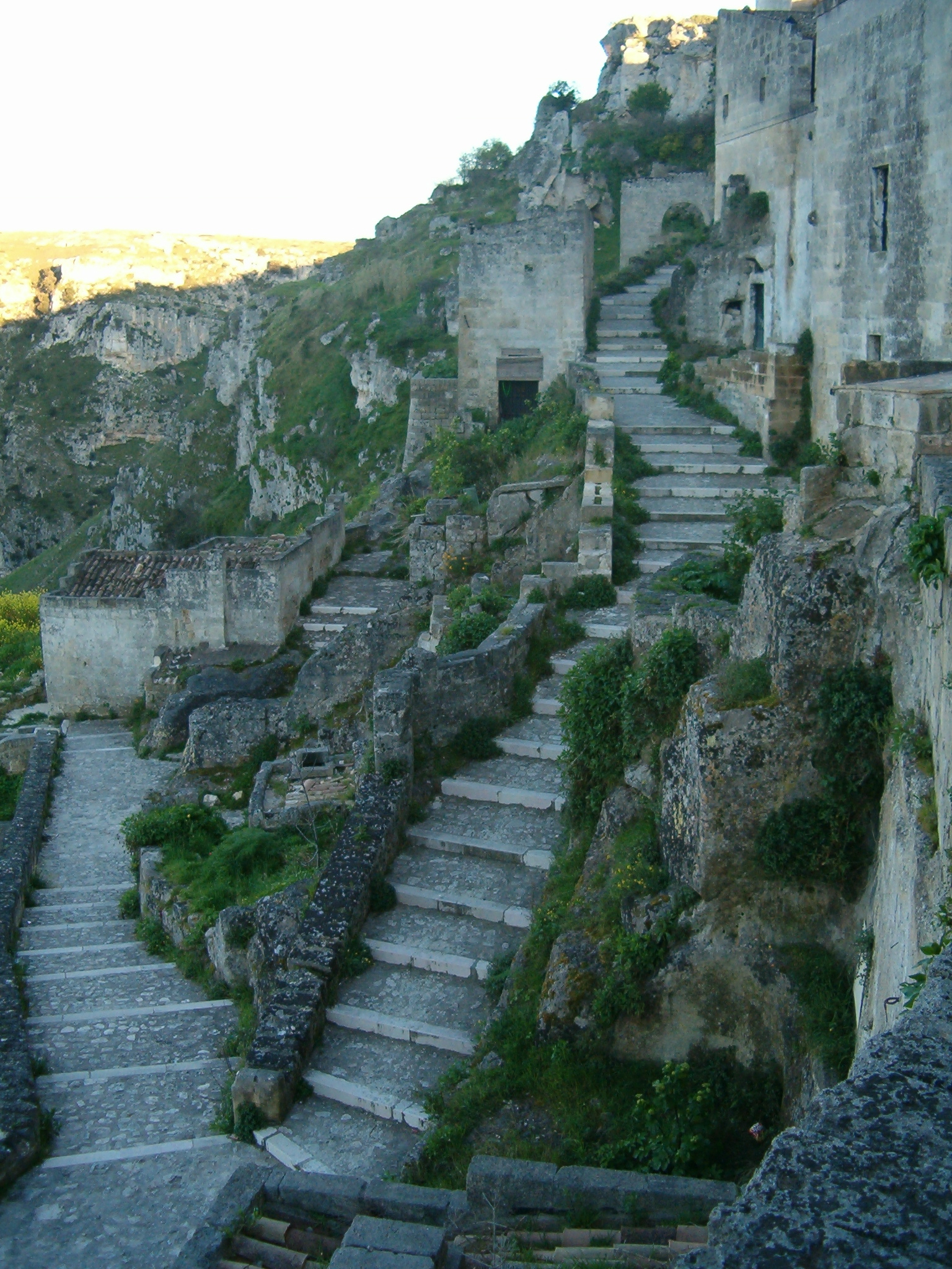 Sassi di Matera (Italy)